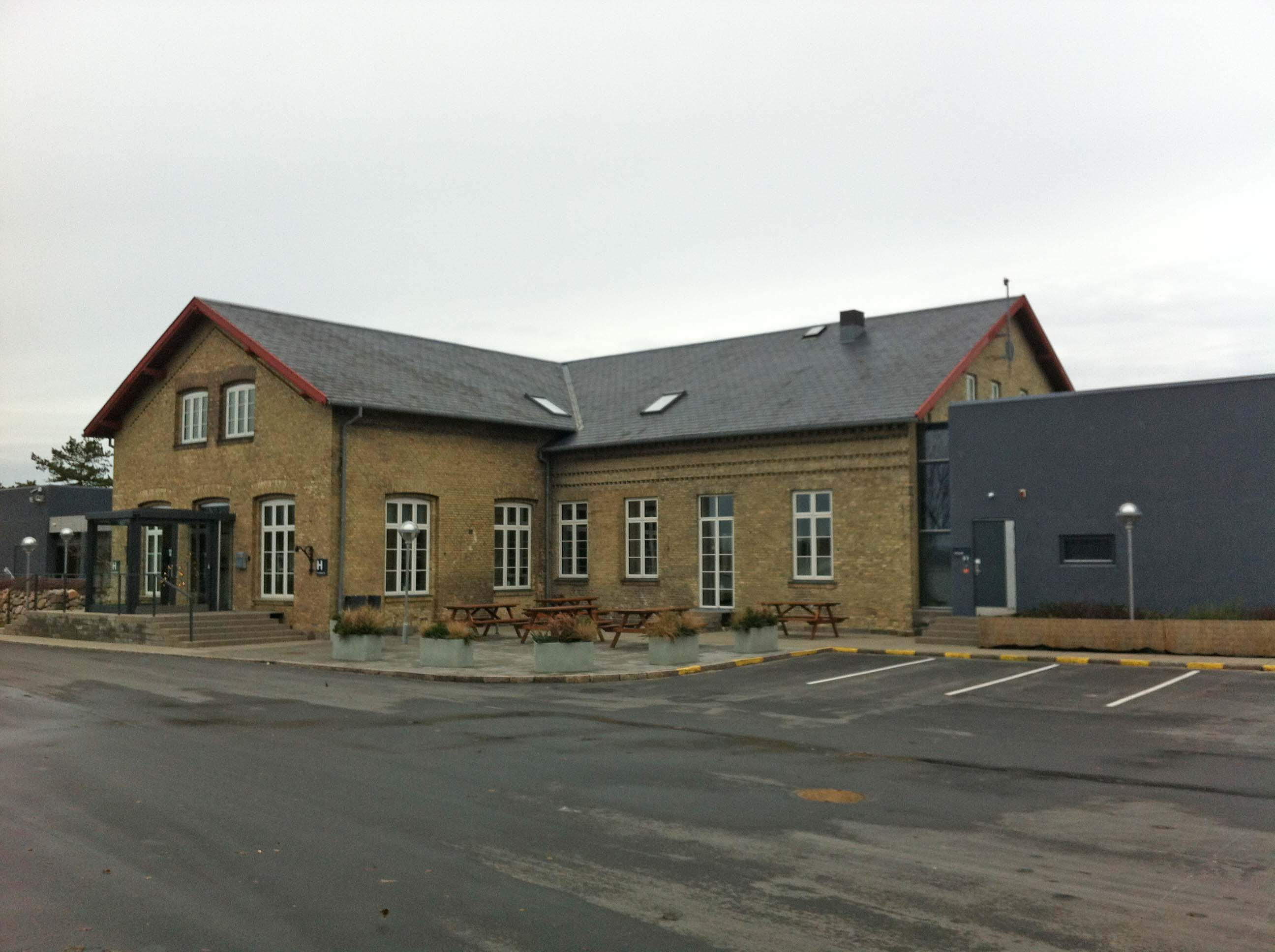 Knudshoved Station fra sporside